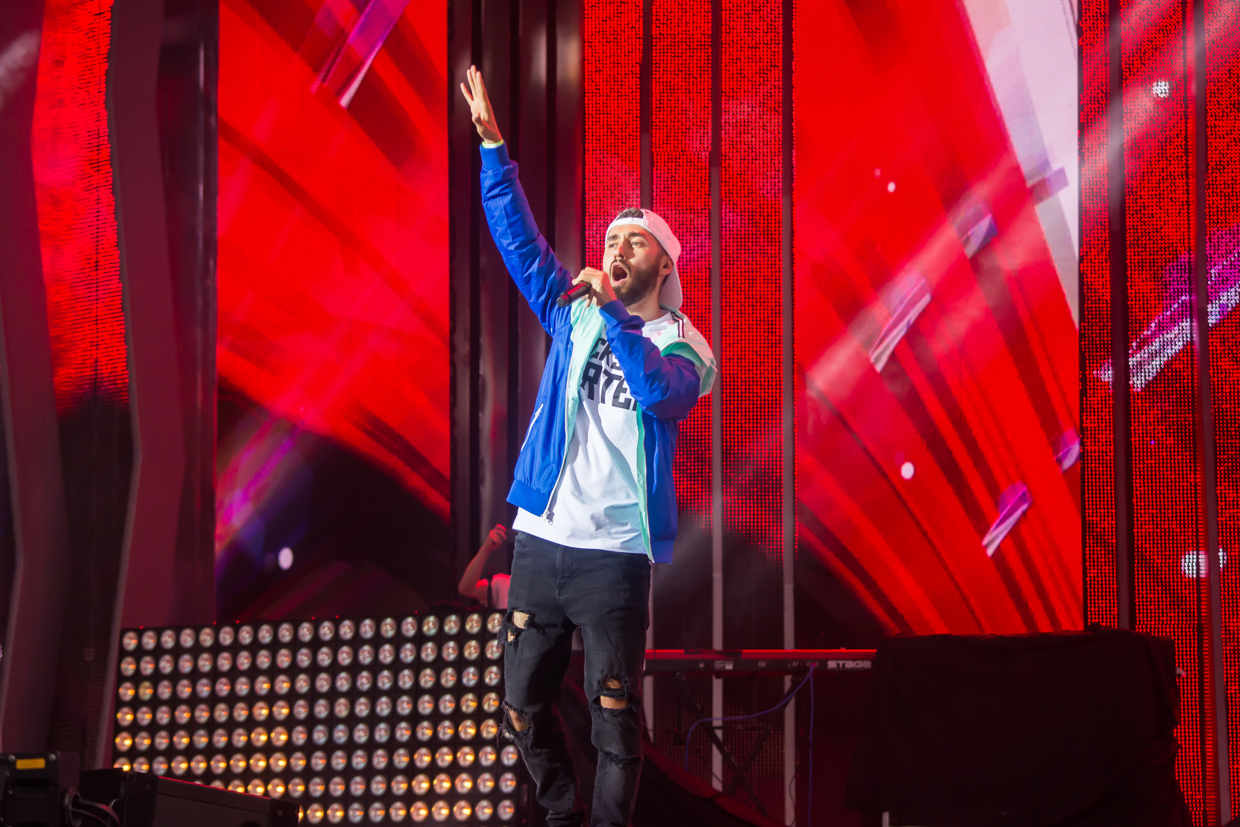 Мот на Europa Plus TV. Hit Non Stop в Витебске 2016